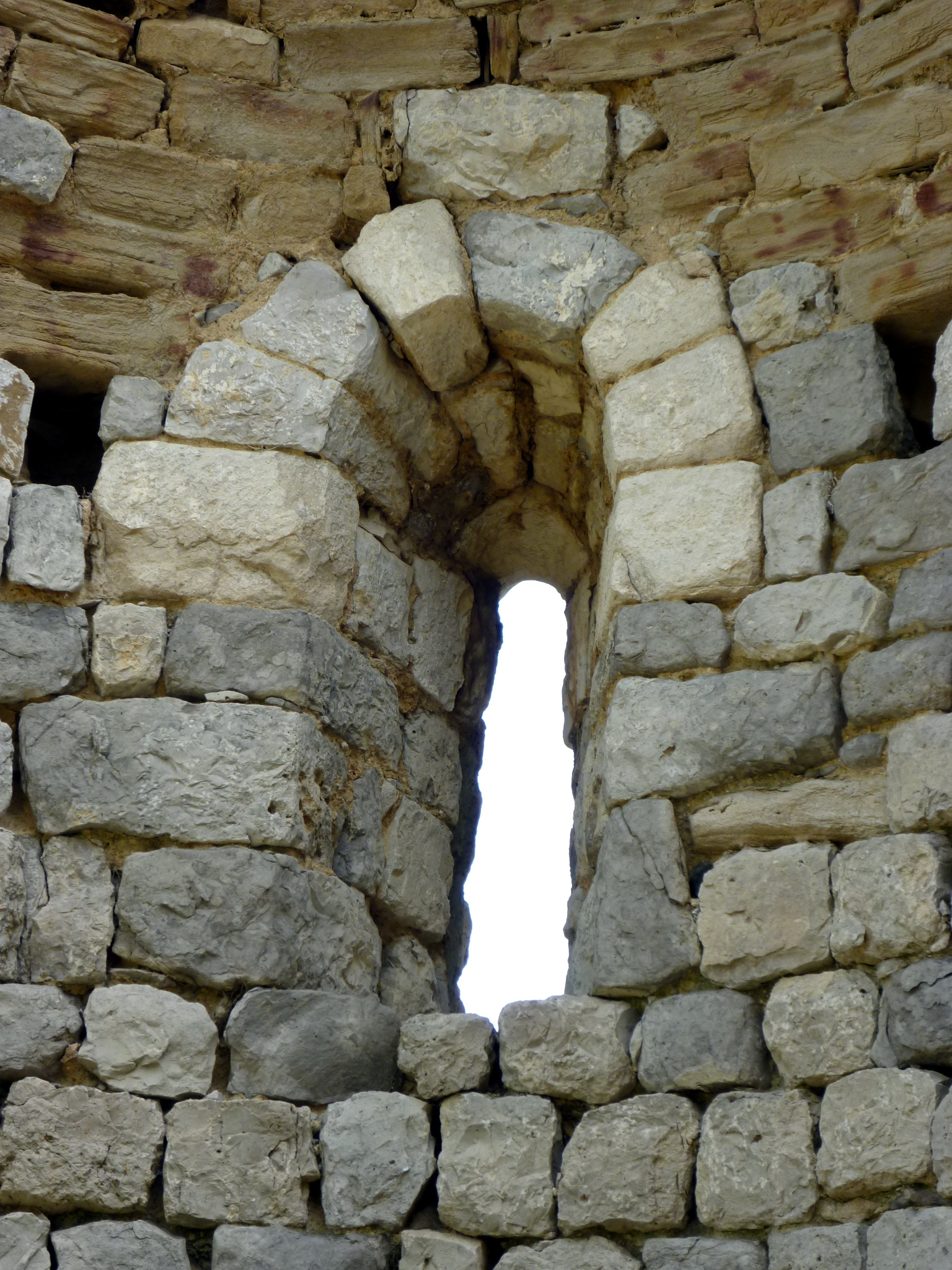 Castelló de Meià (Artesa de Segre)